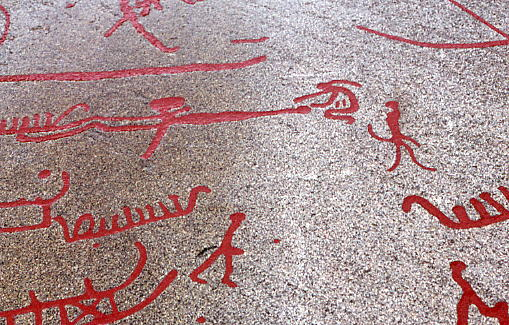 Gravure préhistorique de Tanum, Suède